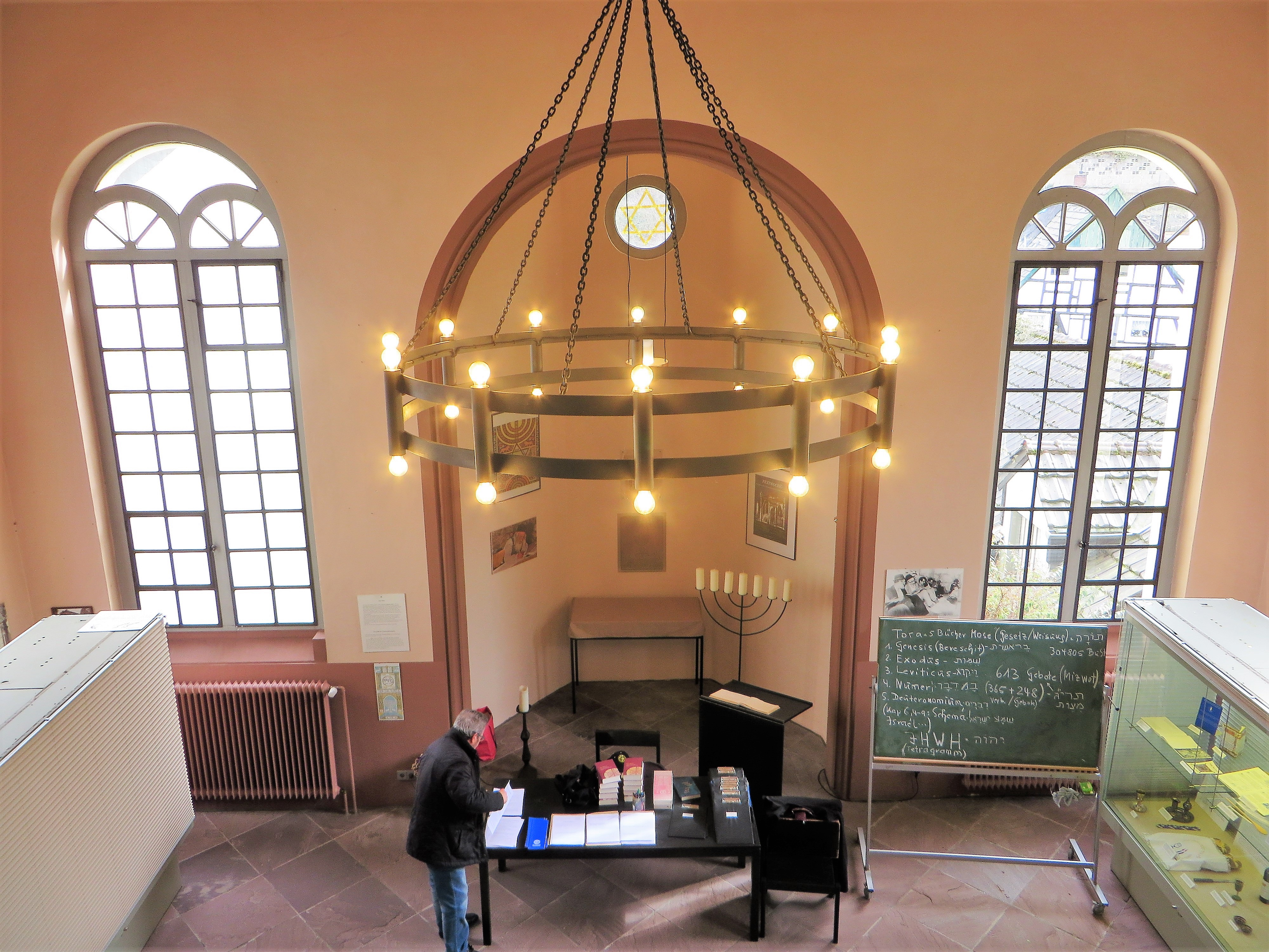 Alte Synagoge Hohenlimburg, Jahnstraße 46. Blick von der Frauenempore in den Betsaal mit der als Apsis angebauten Toranische Richtung Osten (Jerusalem). Darin Menora, Gedenkplatte und Davidstern im kleinen runden Fenster. Früher stand in dem Vorbau der Toraschrein mit den Torarollen, dem kostbarsten Besitz einer jeden Synagogengemeinde. Sie enthalten die fünf Bücher Mose, handgeschrieben auf Pergament. Die Gemeinde hatte keinen Rabbiner, Gottesdienst und Schule wurde von Anfang des 19. Jahrhunderts bis zu seinem Tode im Mai 1933 von Lehrer Simon Kann geleitet.